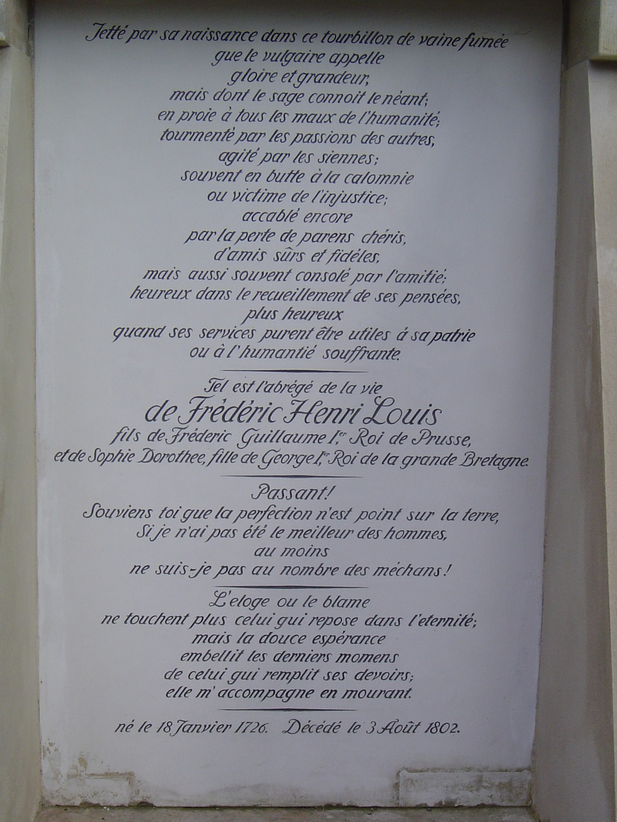 Grabplakette Heinrich von Preußen, Rheinsberg